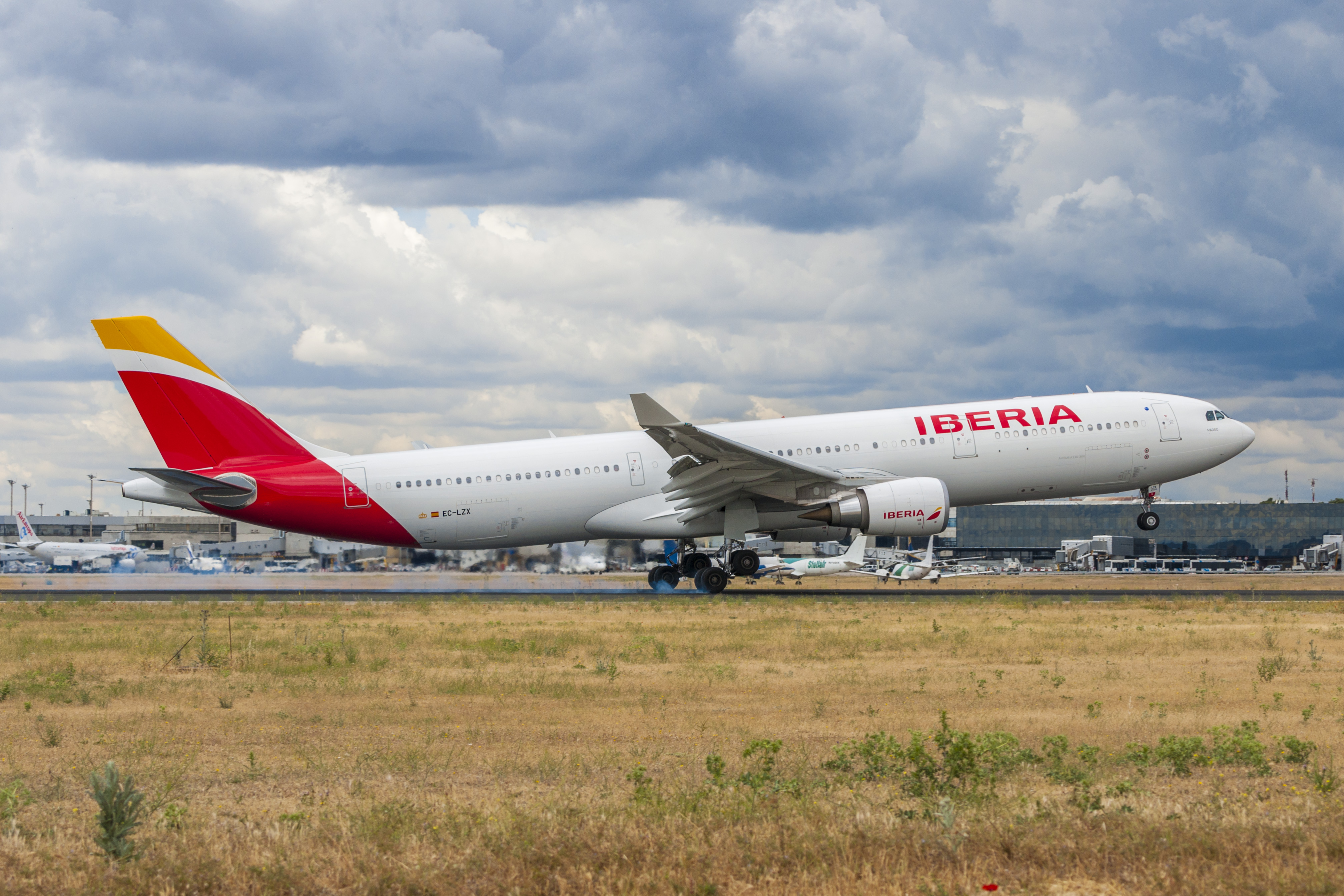 Airbus A330 Iberia Madrid